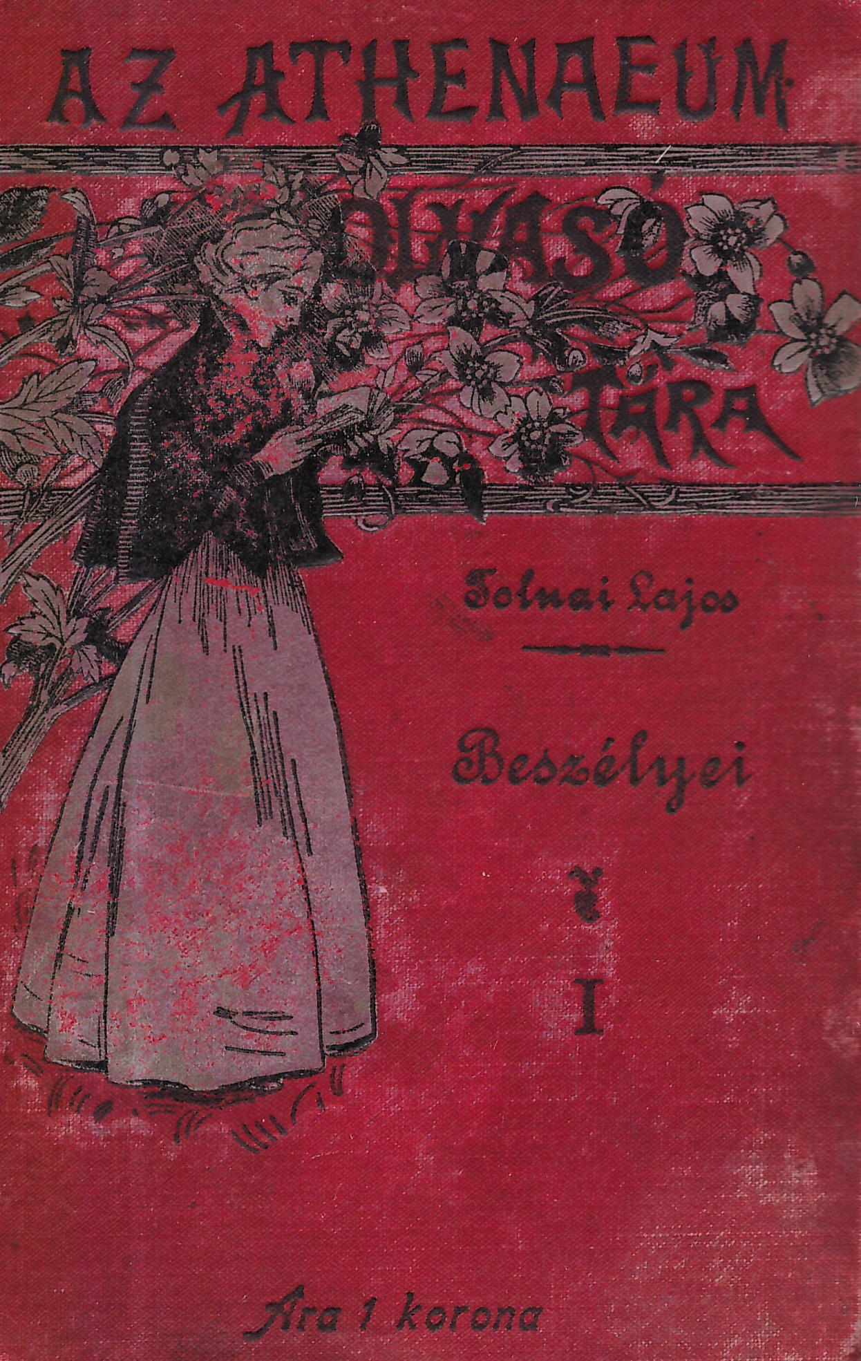 Tolnai Lajos (1837-1902) beszélyei (Athenaeum olvasótára, 1900 körül)